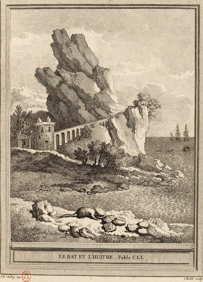 Gravure réalisée par Pierre Quentin Chedel d'après un dessin de Jean-Baptiste Oudry représentant la fable Le rat et l'huître de Jean de La Fontaine (fable 9 du livre VIII). Cette gravure est parue dans l'édition complète des fables de La Fontaine, parue en quatre tomes chez l'éditeur Desaint & Saillant, rue saint Jean de Beauvais à Paris, 1755-1759.